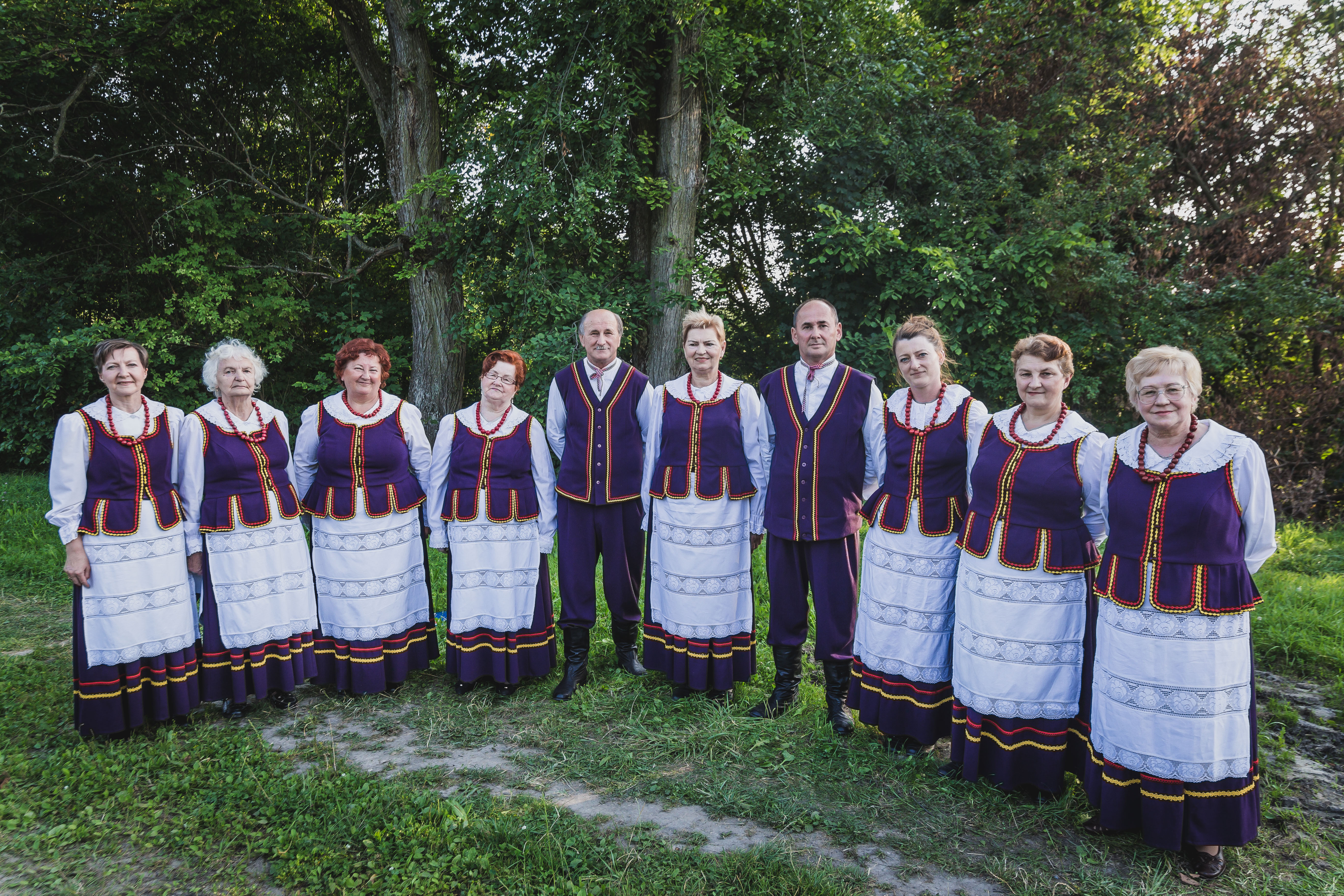 Zespół Klepaczanki w sierpniu 2017 roku.